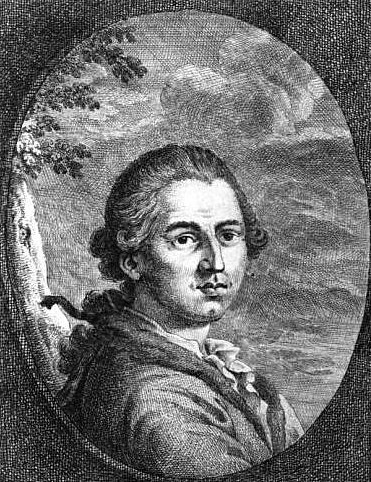 Portrait des Stuckateurs Carlo Luca Pozzi.